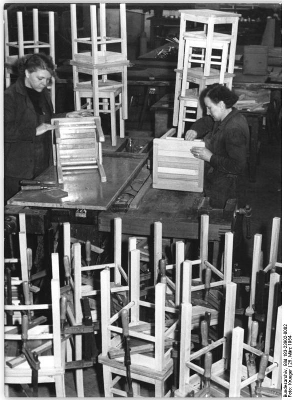 Berlin, Möbelfabrik, Montage Zentralbild Krueger 25.3.1954 Massenbedarfsartikel aus dem RAW Schöneweide, Berlin Die Kollegen des Reichsbahnausbesserungswerkes Berlin-Schöneweida stellen zu 90 % aus Material, das bei der Reparatur von Reichsbahnwagen übrigbleibt, monatlich 700 Hocker, 1000 ußbänke und insgesamt etwa 200 Kohlenkästen und 8000 Äxte her. Sie helfen damit, die Verordnung des Ministerrates-"Mehr und bessere Massenbedarfsgüter für die Bevölkerung"- zu verwirklichen. UBz: Die Werkhelferinnen Gerda Freund (DDR-Meisterin im Kanufahren) und Charlotte Matz (rechts) verputzen Hocker.